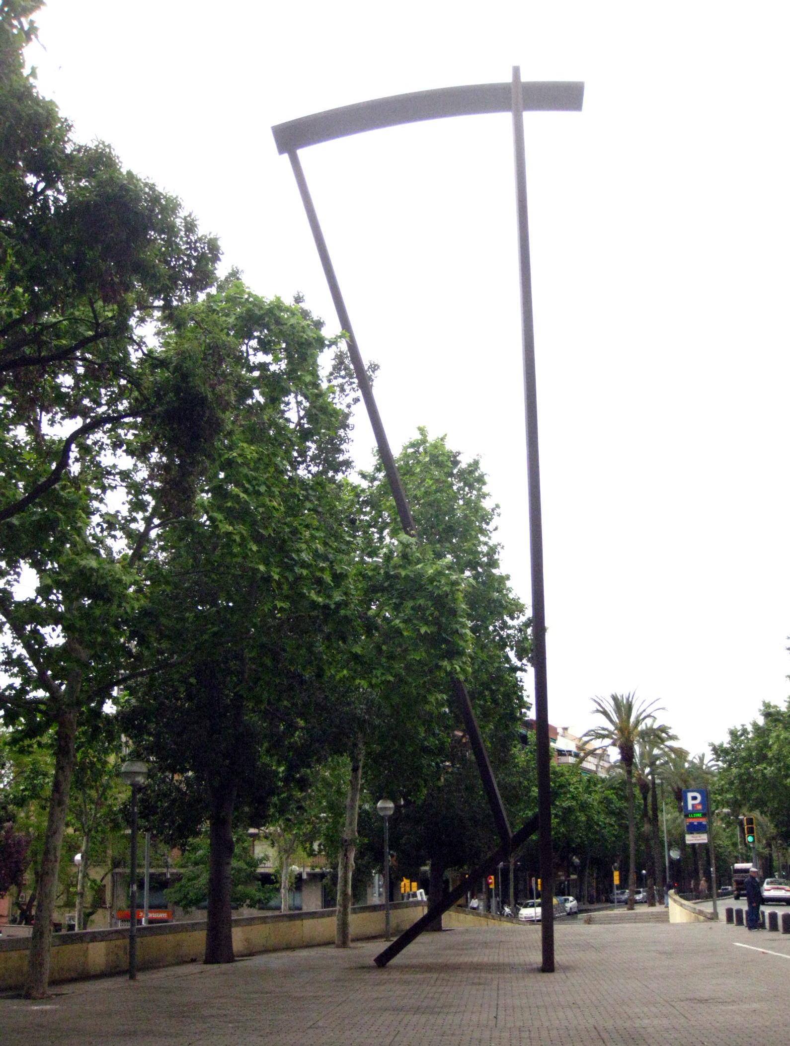 Als nous catalans (Sergi Aguilar). Via Júlia (Barcelona)